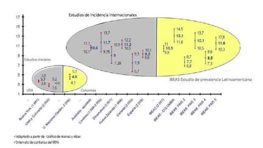 Este es un gráfico creado con el propósito de ilustrar el comportamiento de los diferentes estudios realizados en el mundo